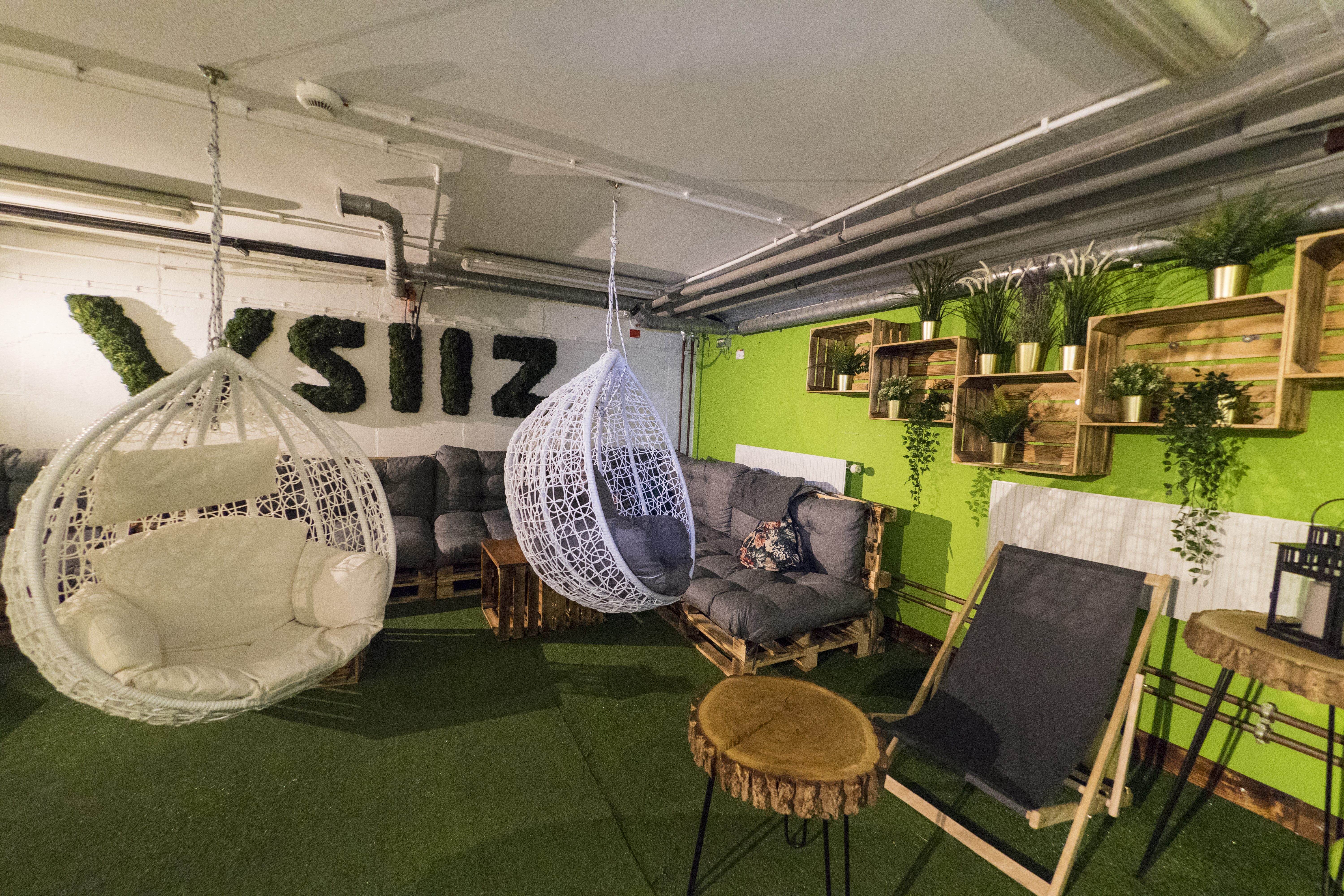 Strefa Studenta WSIIZ